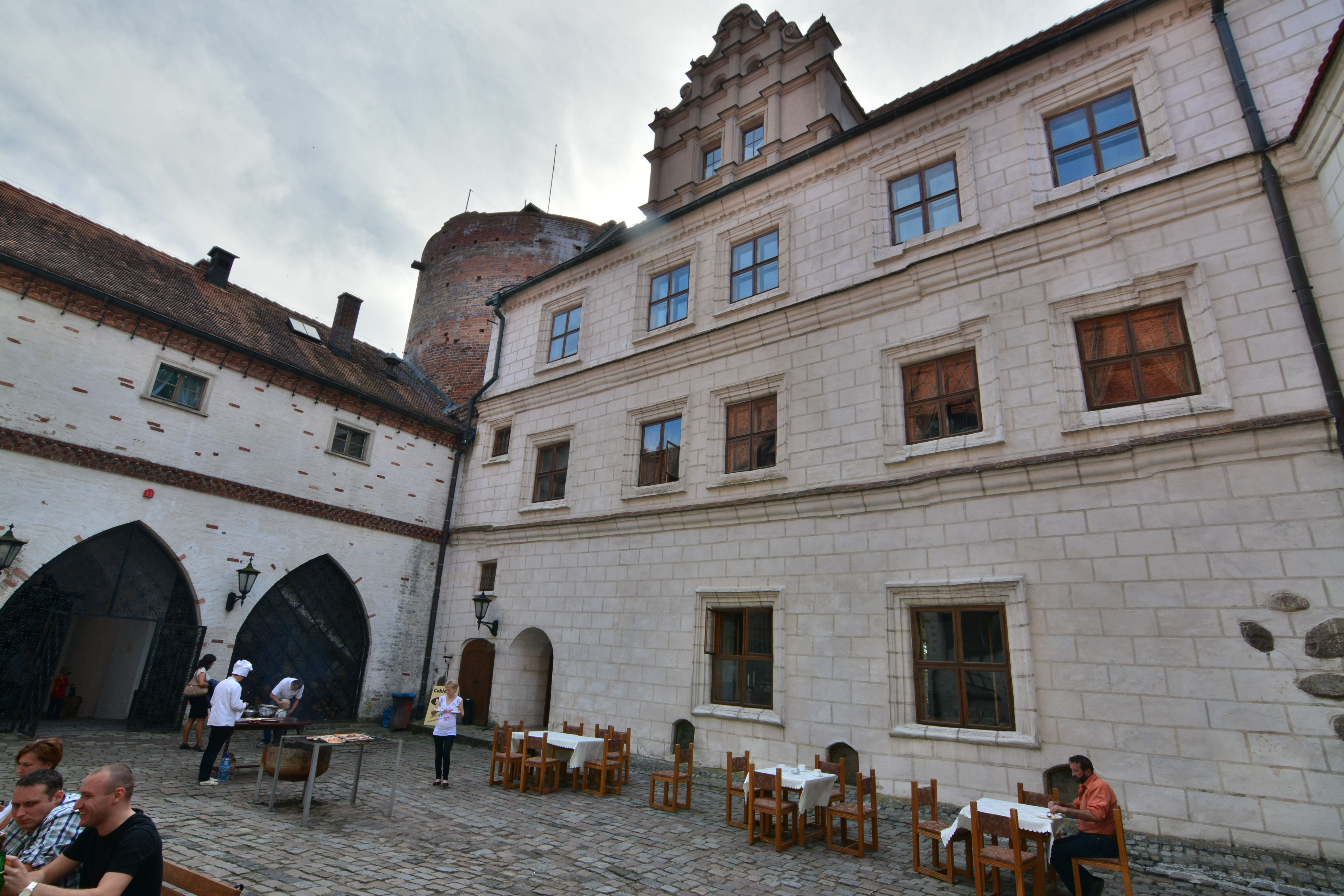 Pęzino - zamek, XIV, 1 poł. XVI, 1600, XIX